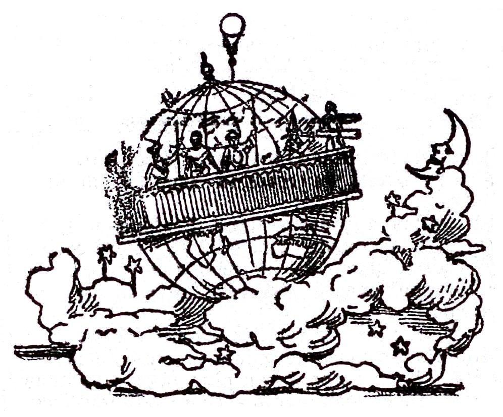 Le Char du Monde dans le cortège parisien de la Mi-Carême 1900.